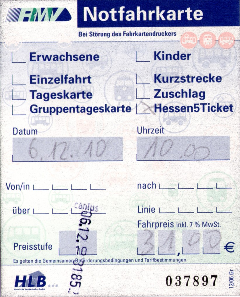 Notfahrkarte für den Rhein-Main-Verkehrsverbund (RMV), ausgegeben durch die Hessische Landesbahn